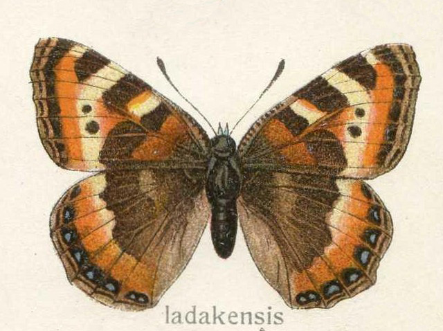 Nymphalis ladakensis, Nymphalidae